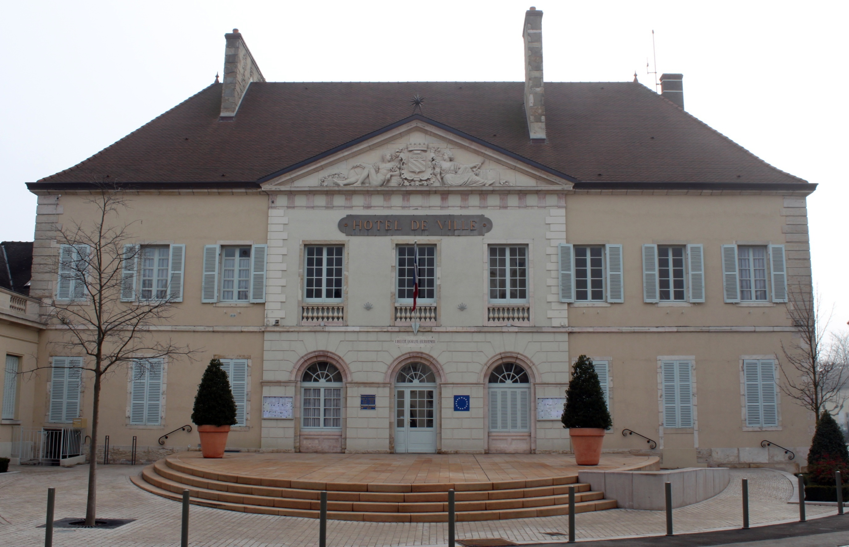 Nuits-Saint-Georges, Bourgogne, France